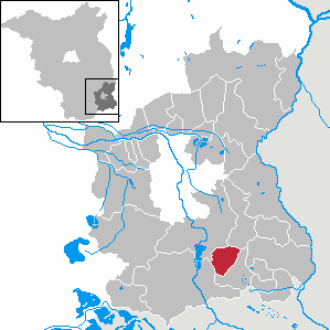 Hornow-Wadelsdorf in Brandenburg (Country) - District Spree-Neiße